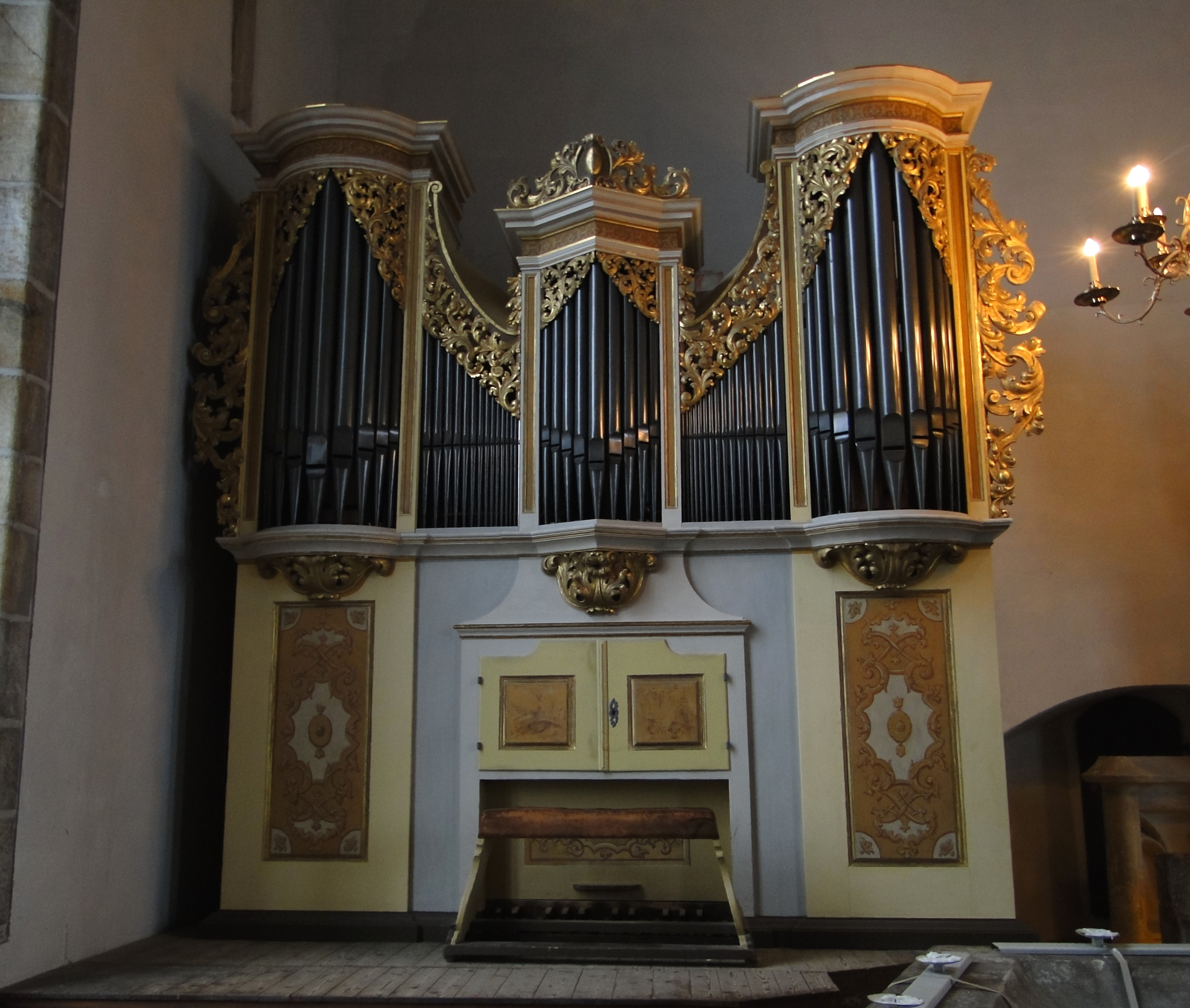 Freiberger Dom, Chororgel von Gottfried Silbermann